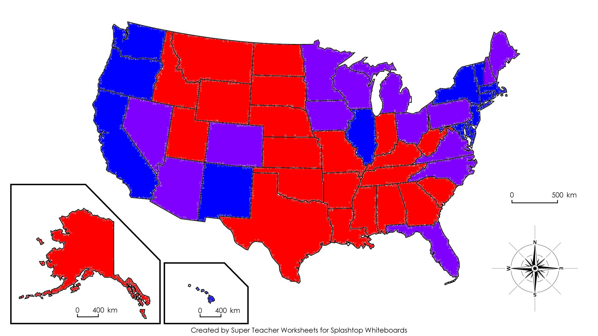 Выборы Президента США 2016 года